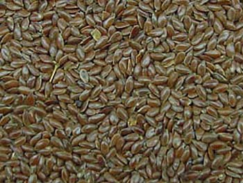 Flax seed